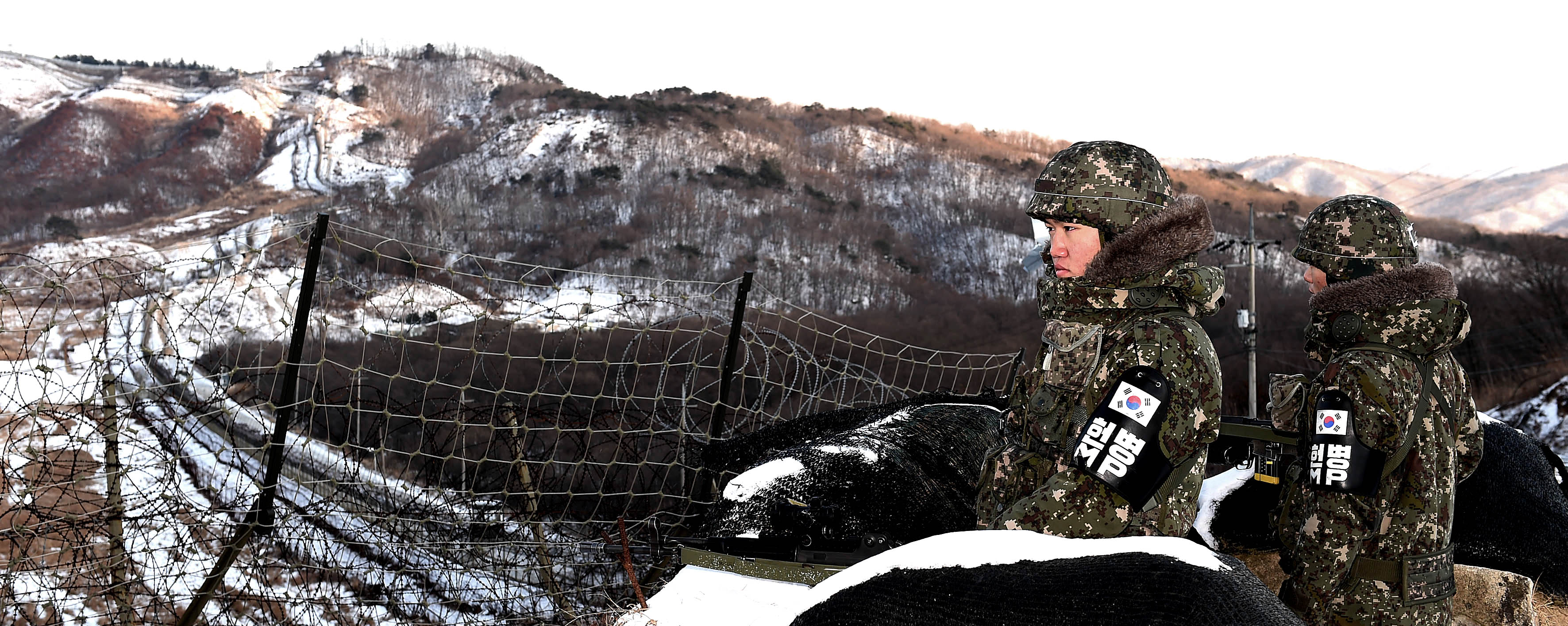 최전방의 겨울은 유난히 춥고 길다. 살을 에는듯한 혹한이 몰아친 16일 강원도 철원 최전방 지역의 경계를 맡고 있는 육군 6사단 GOP초병들이 철책 너머 전방을 주시하며 철통 경계근무에 만전을 기하고 있다. 촬영 - 김태형 기자